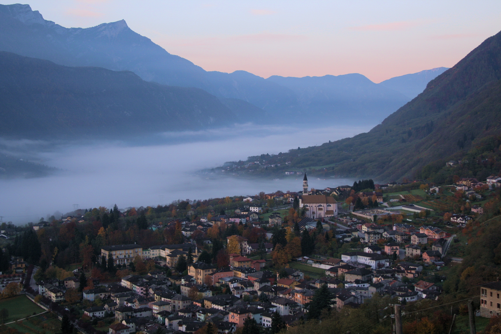 Vista di Roncegno, provincia di Trento